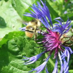 Bombus sylvarum